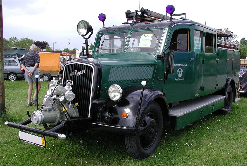 Opel Blitz LF15, Fahrzeug für die Feuerlöschpolizei 1939